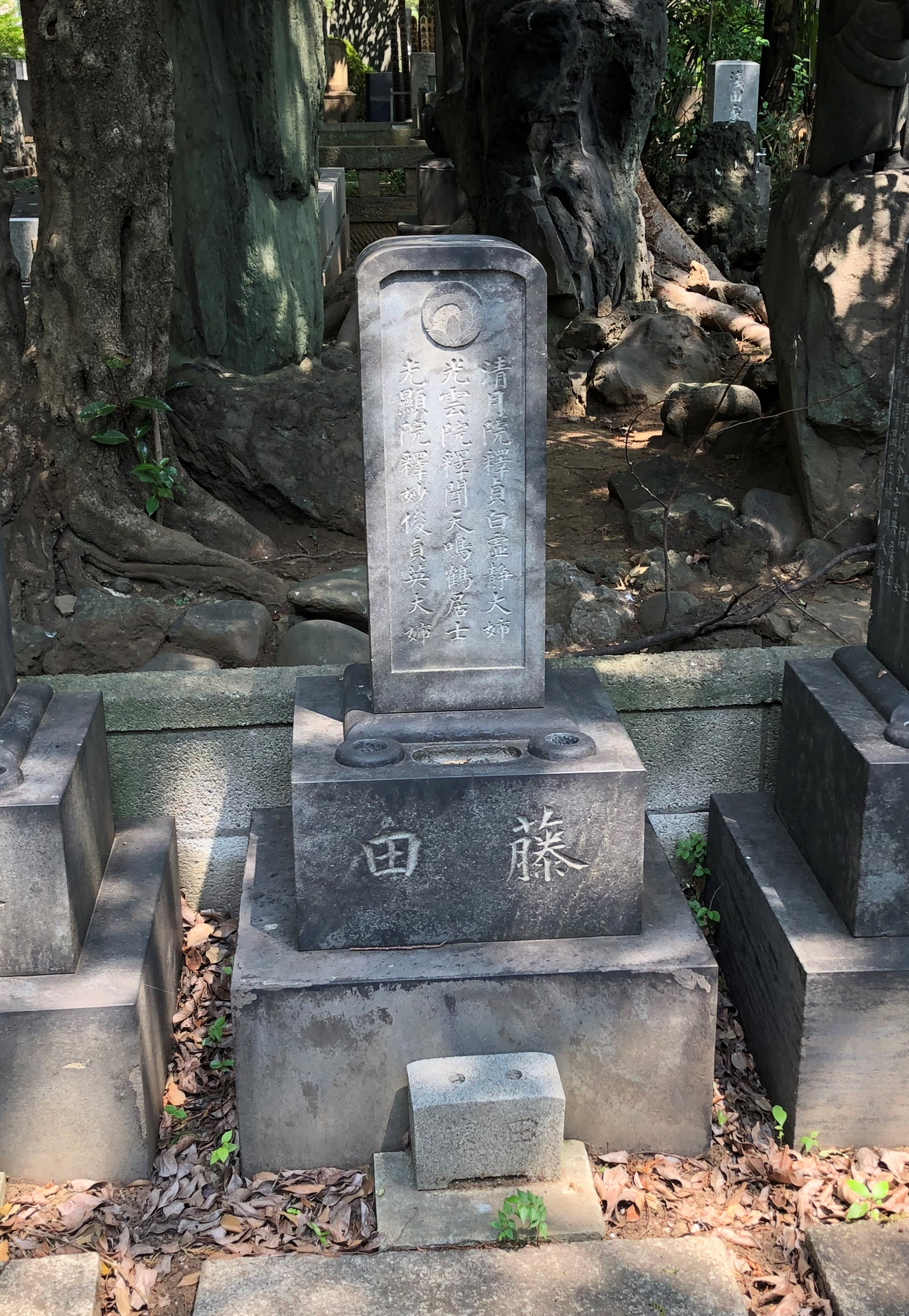 明治前期の新聞記者・政治家であった藤田茂吉（1852-92）の墓。谷中霊園乙8号10側。